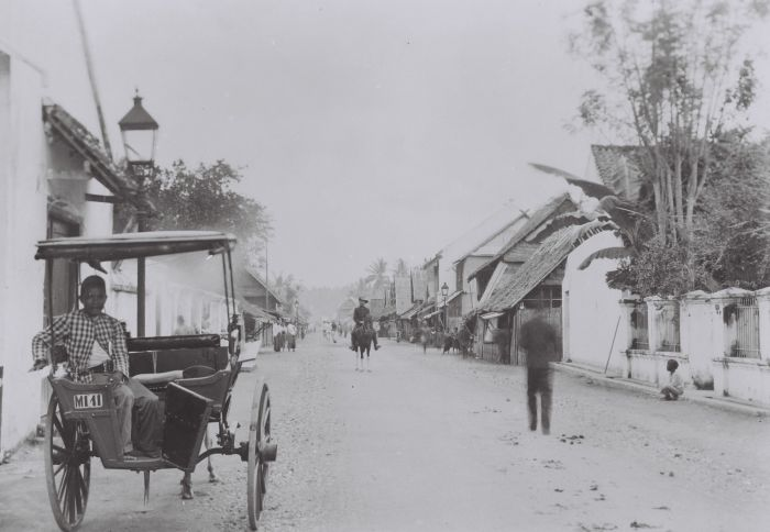 foto. Straatgezicht in Kampong Baroe met lokale bevolking, een rijtuig en een KNIL militair te paard